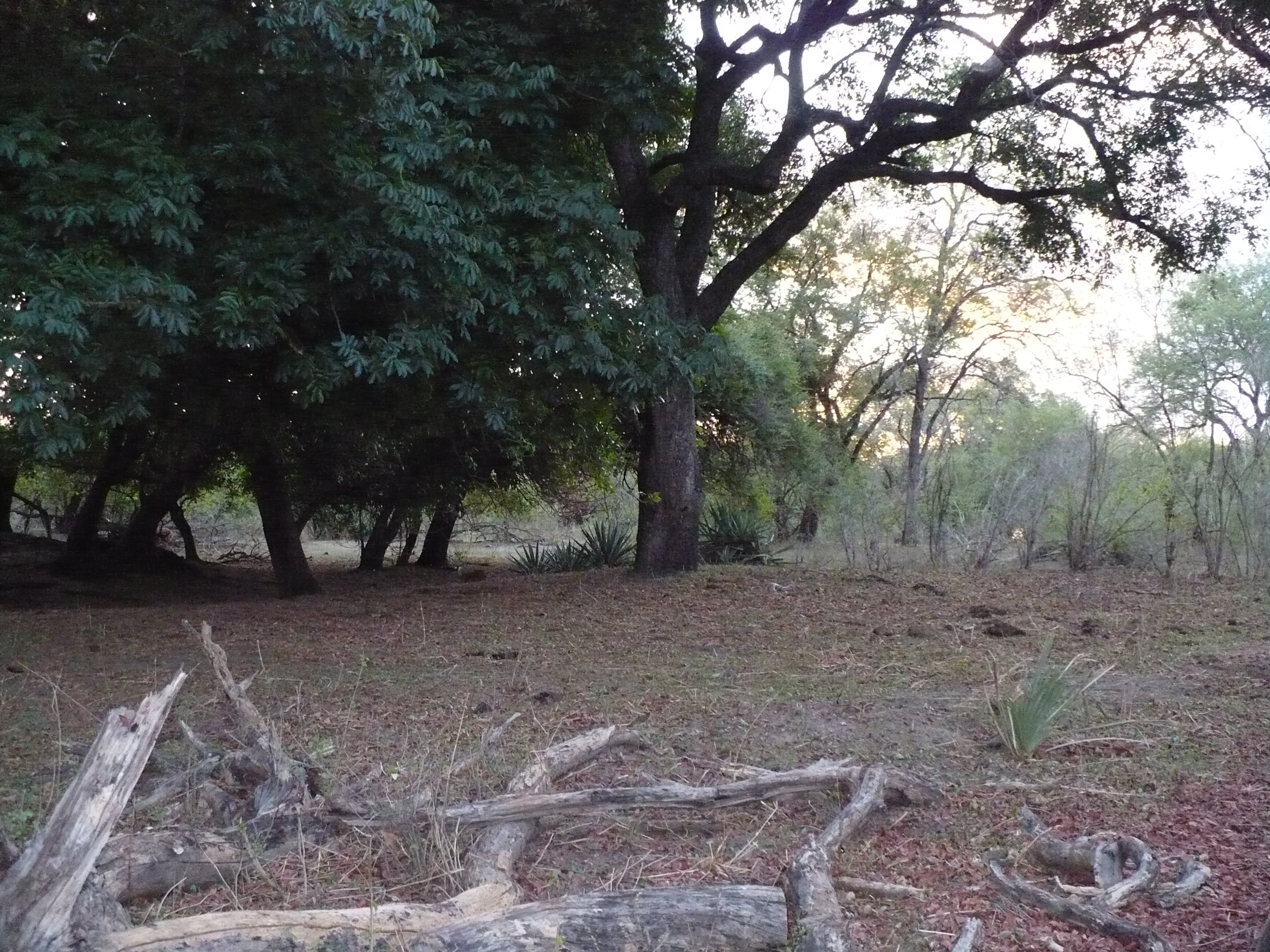 Landscape, Zambia